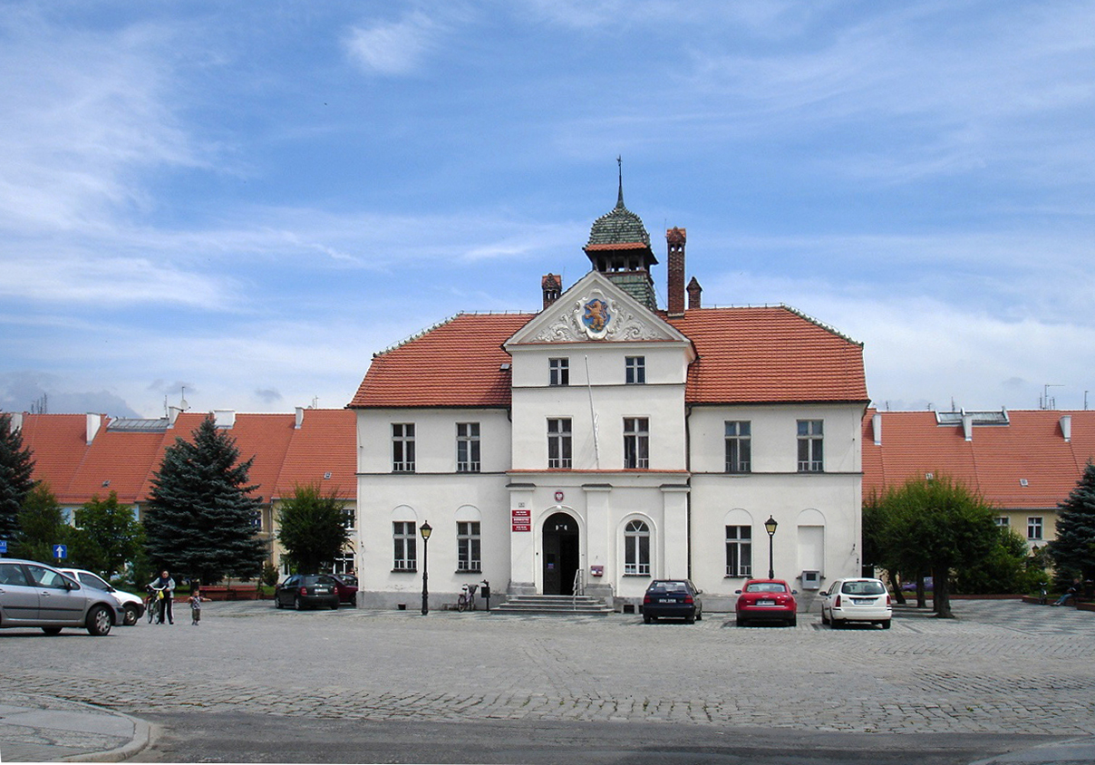 Lewin Brzeski - ratusz